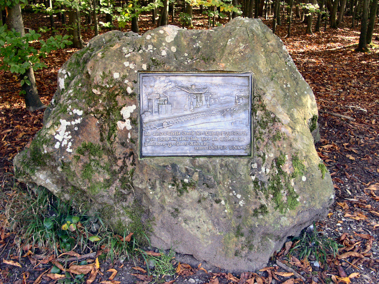 1994 aufgestellter Gedenkstein mit Plakette am ehemaligen Bahnhof Forsbach, Stadtgebiet Bergisch Gladbach